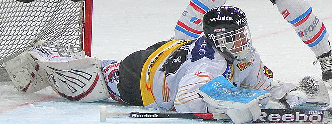 Le gardien du CP Berne Marco Bührer